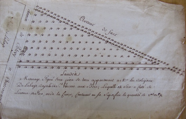 Dessin de l'avenue qui menait à l'abbaye de Saint-vincent